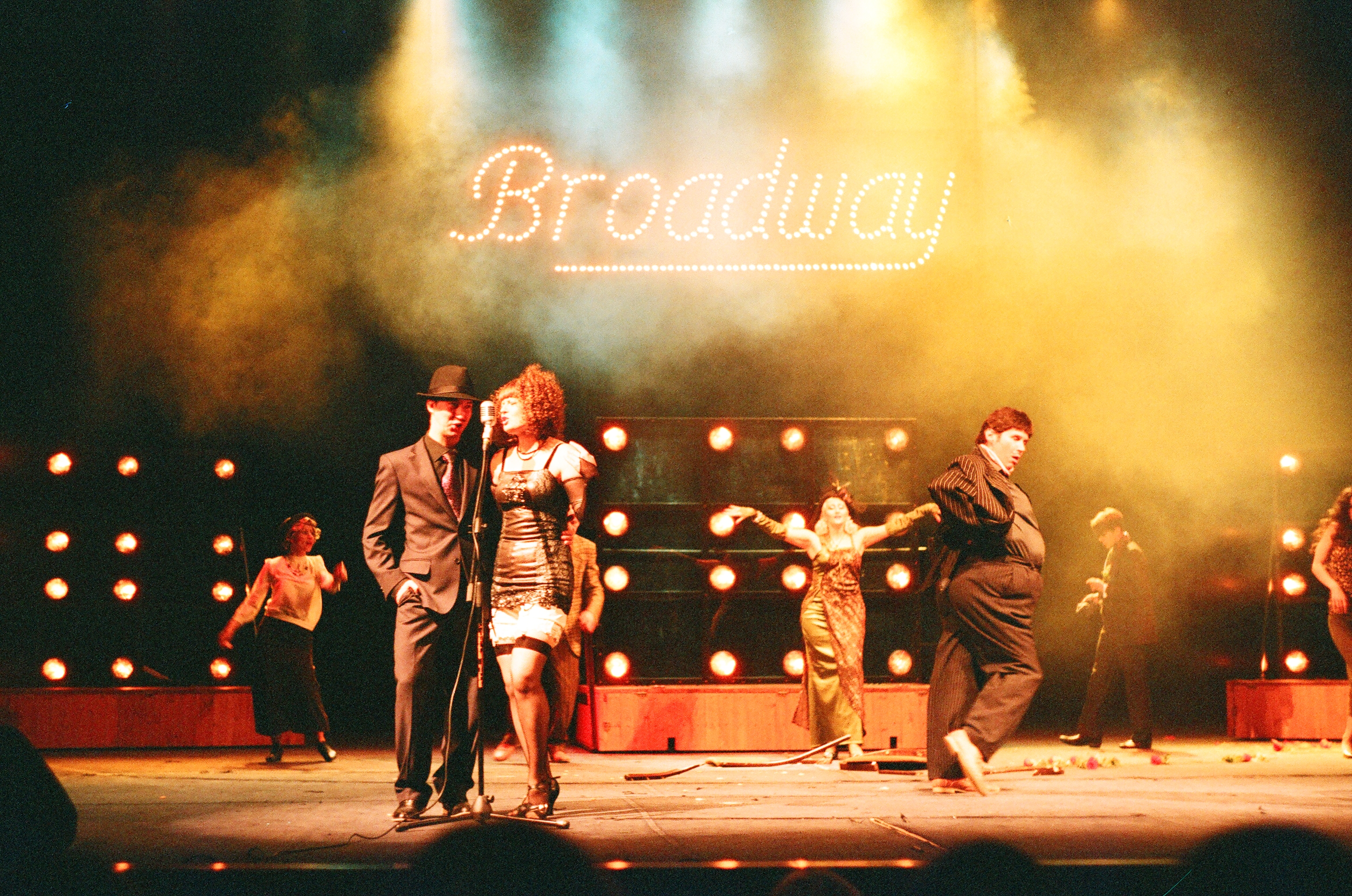 Спектакль «Бродвей». Новокузнецкий драматический театр.